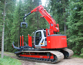 Elliator E235B SR XXLc – eine Kombination aus einem vollwertigem Hydraulikbagger und einem Rückezug. Neben Forstschleppern wird der Elliator überwiegend zu Holzrückearbeiten in der Wald- und Forstwirtschaft eingesetzt. Er wird als eine wendige Maschine bezeichnet, die bodenschonend zur Holzernte eingesetzt werden kann. Entwickelt von der Firma EMB Baumaschinen Handelsgesellschaft mbH